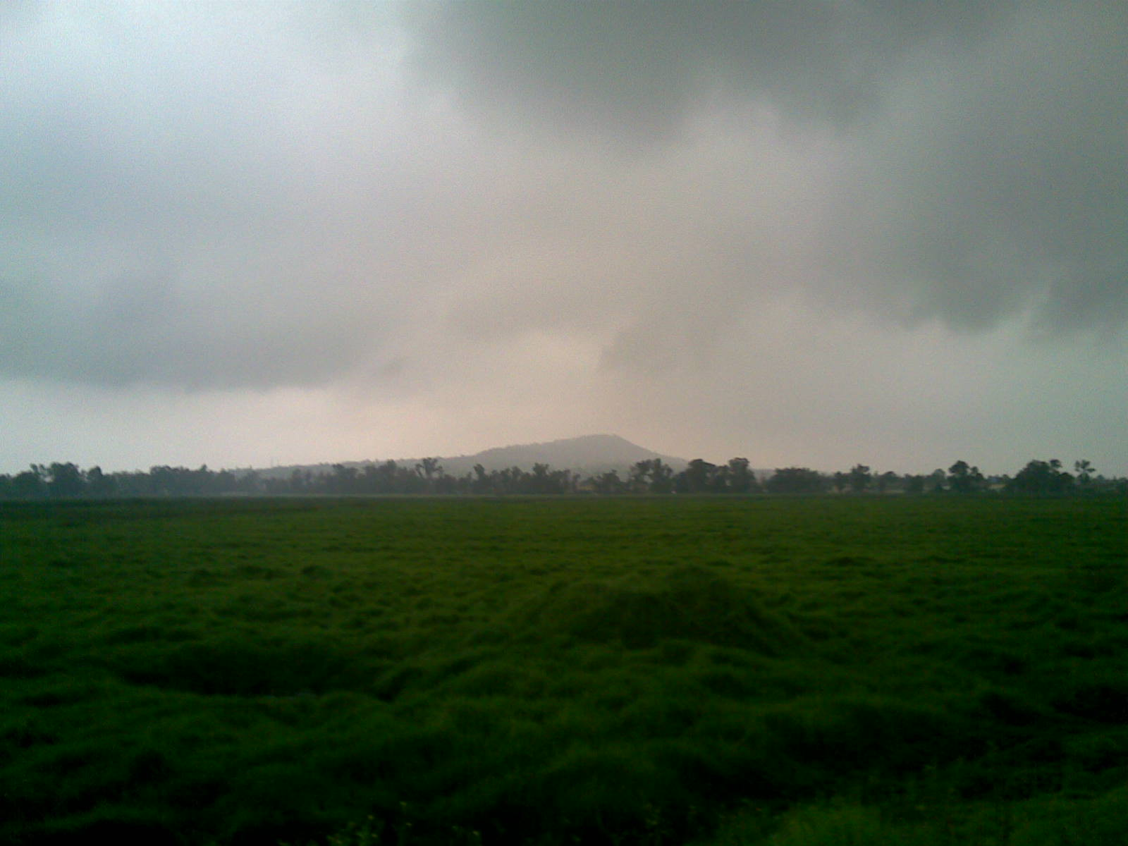 El cerro de la estrella visto desde un paraje cercano.